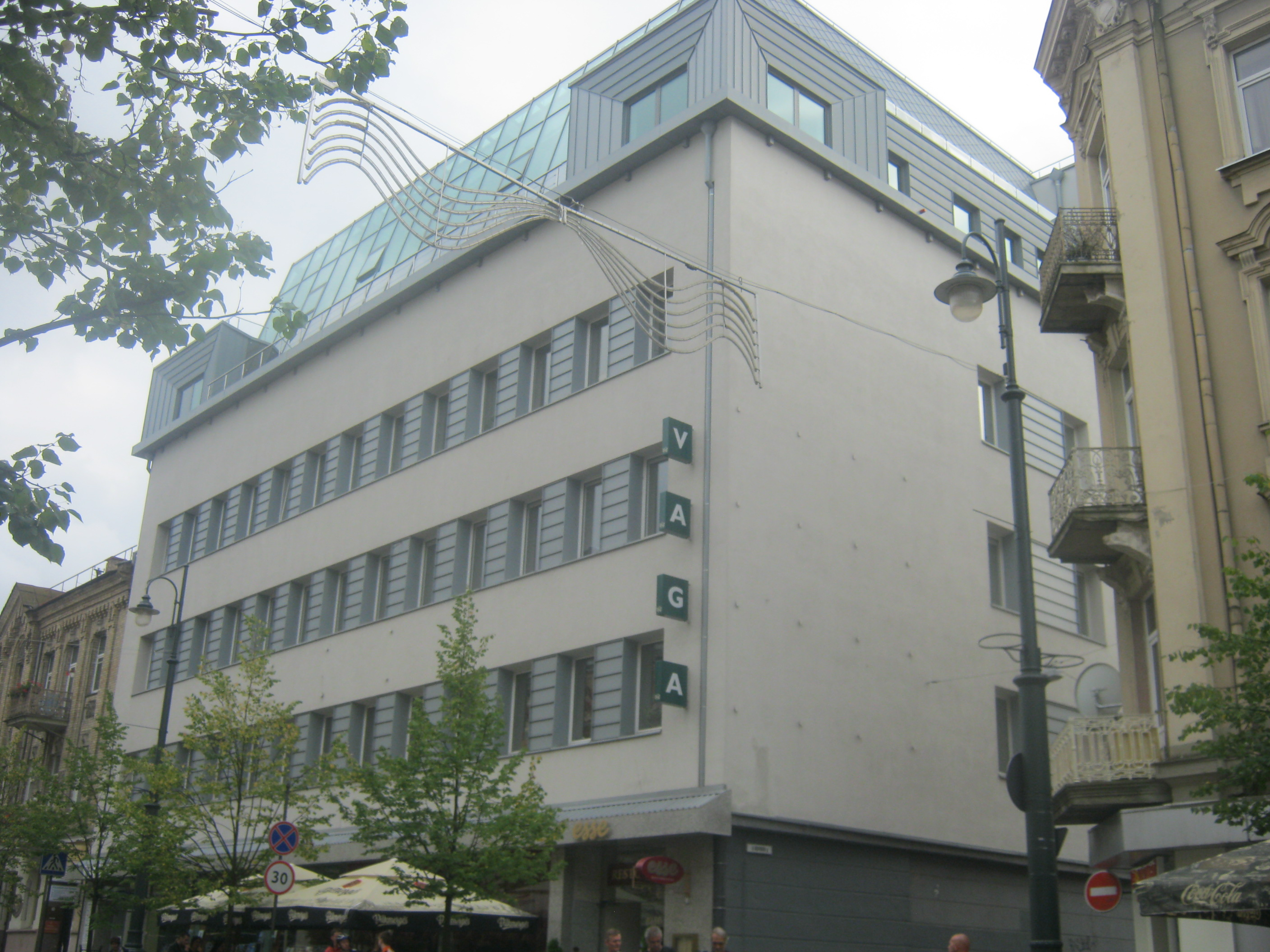 Leidykla Vaga